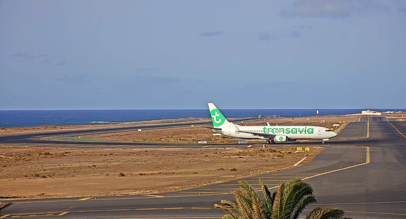 Een toestel van Transavia is zojuist geland op de luchthaven van Lanzarote.